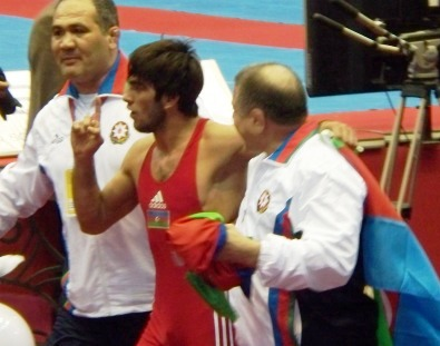 Борец Махмуд Магомедов после победы в финале ЧЕ по борьбе в Баку